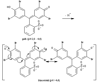 Bromphenoblau (de), color in solution at pH 2,8 - 4,4